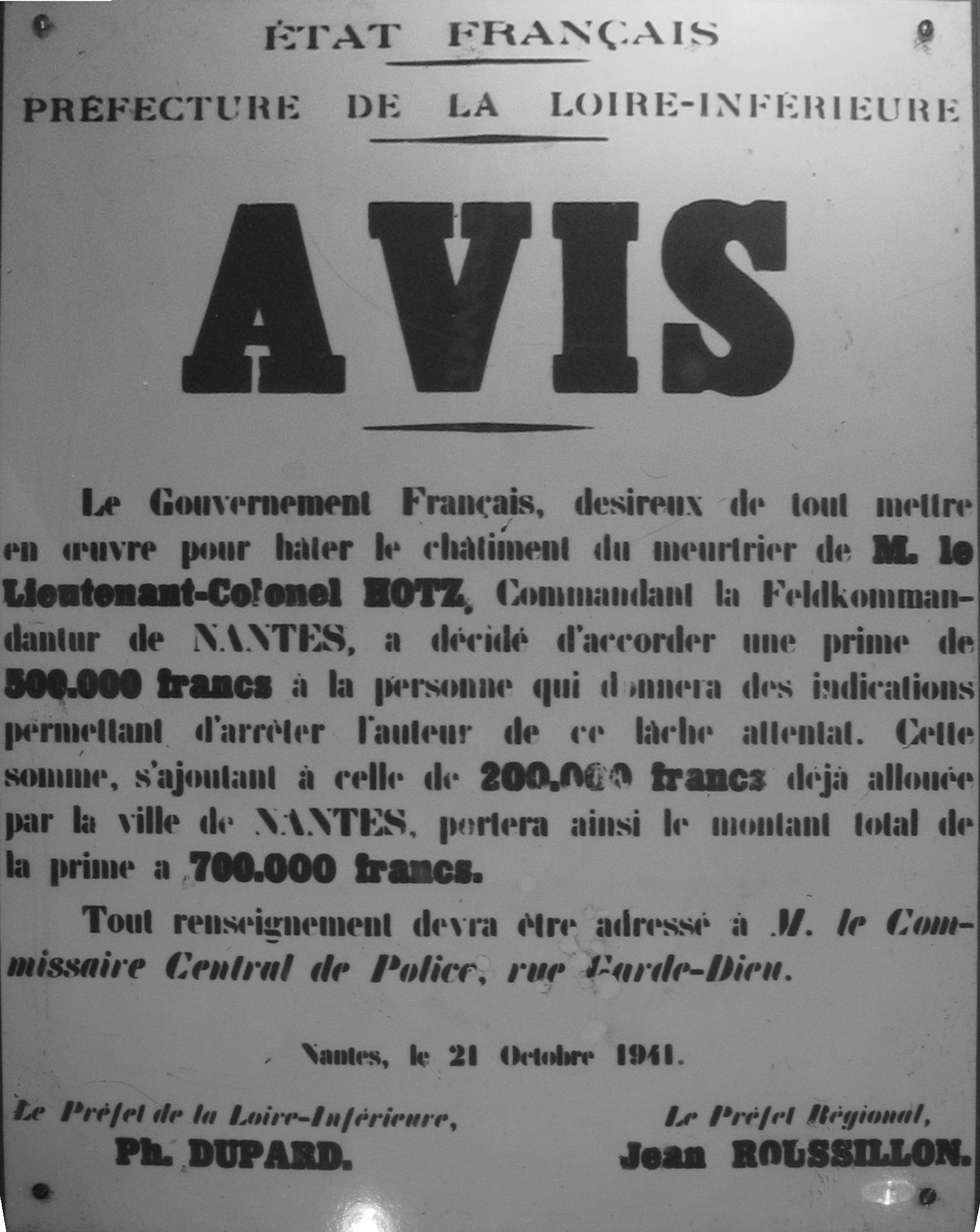 Exposition métro Guy Môquet, Paris.